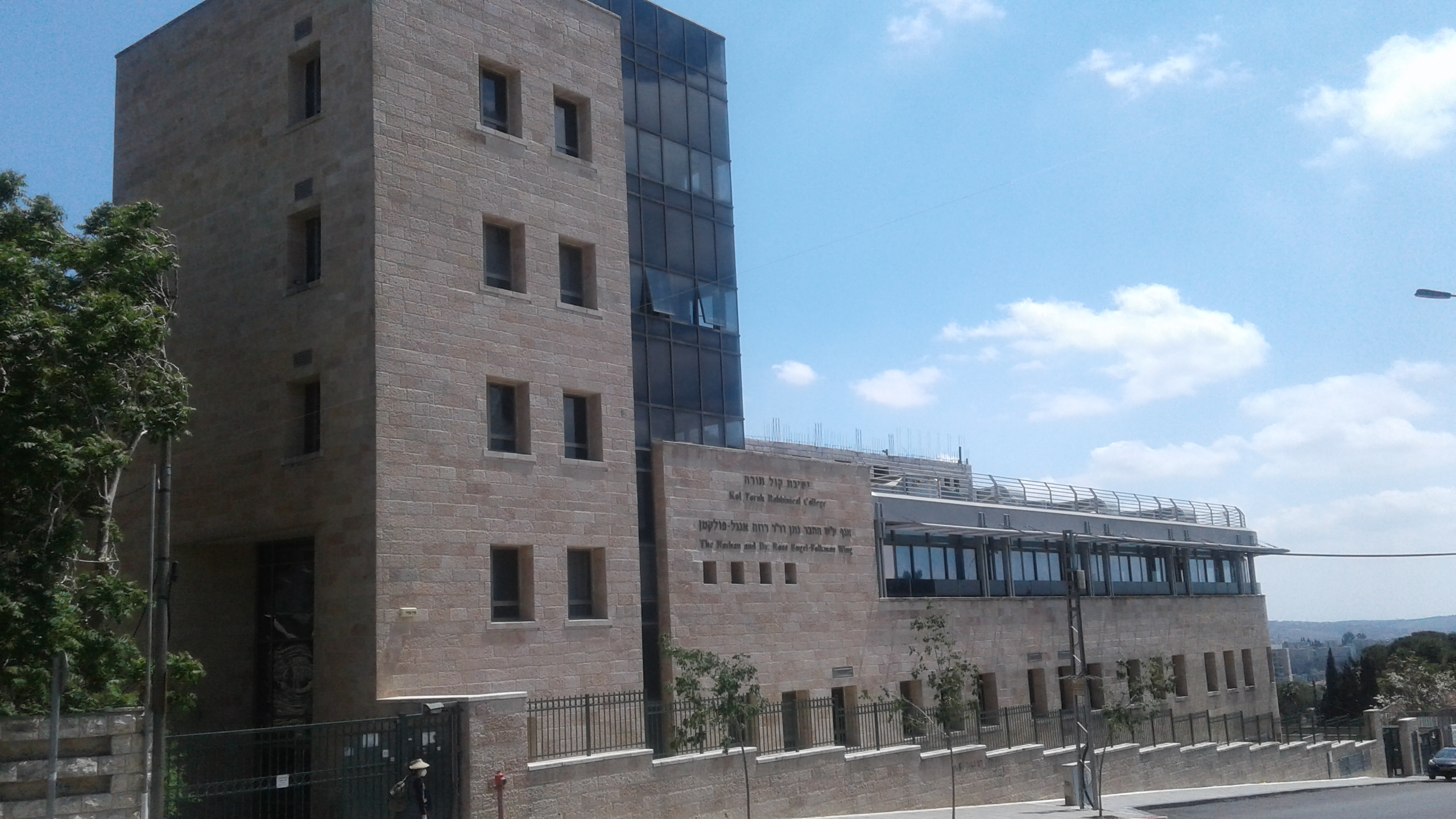 בניין ישיבת קול תורה בשכונת בית וגן בירושלים